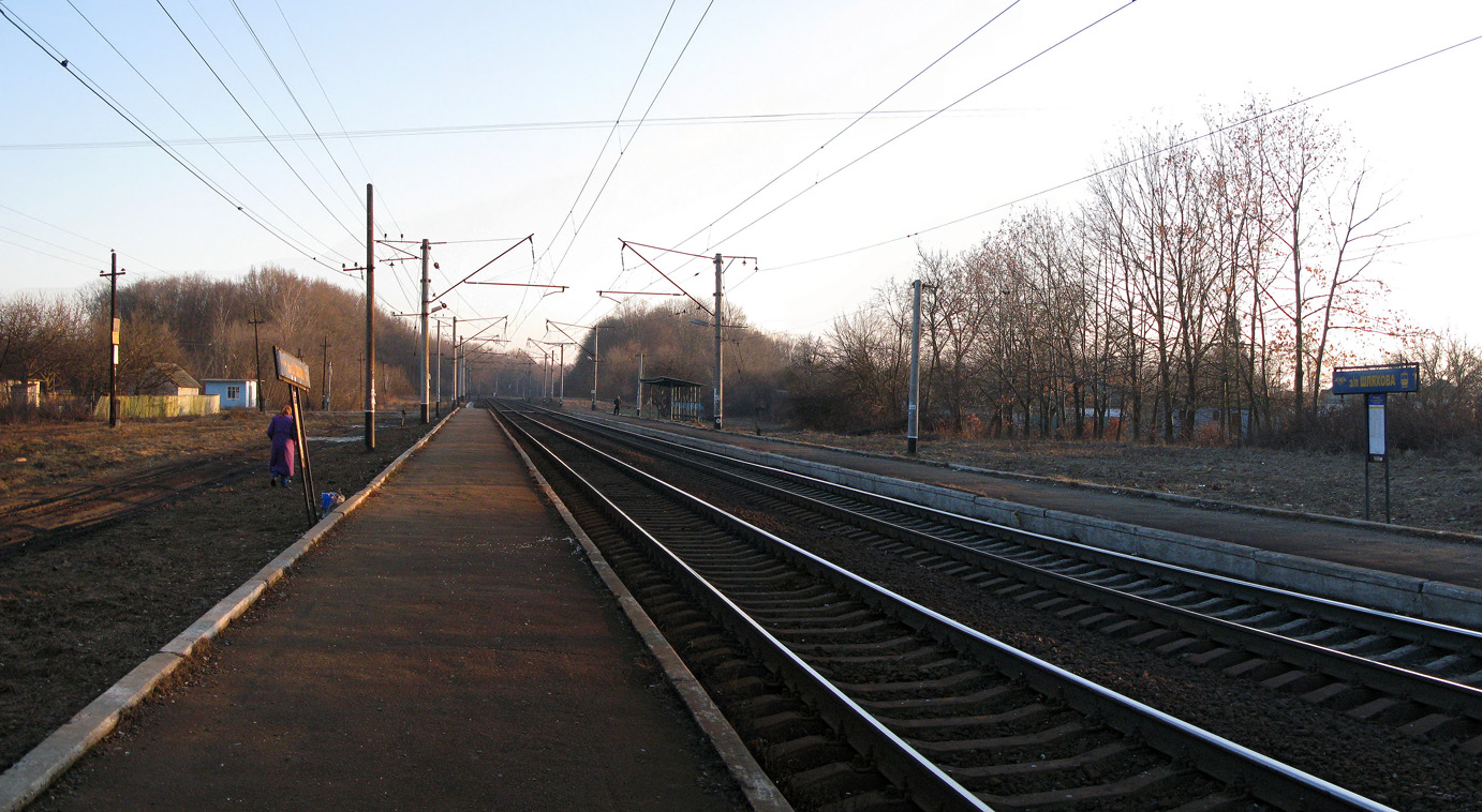 Платформа Шляхова